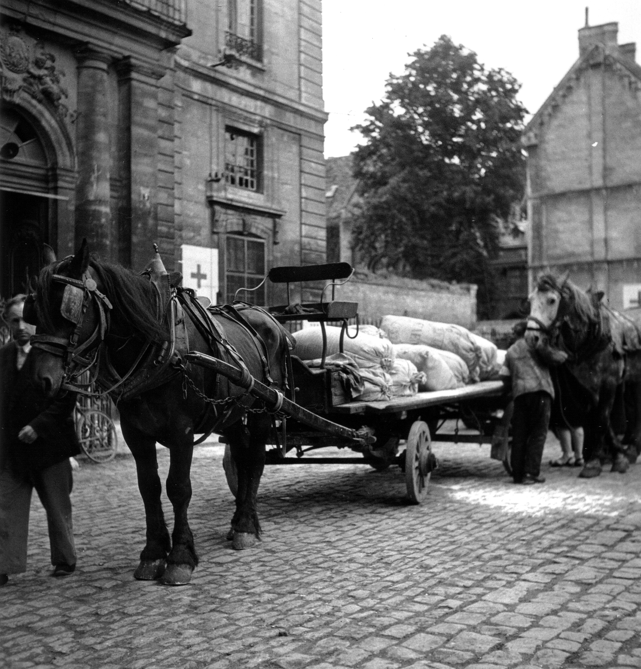 Après la libération de la rive gauche de la ville, de la nourriture est apportée sur un chariot tiré par un cheval aux civils s'étant réfugiés dans l'église Saint-Étienne.